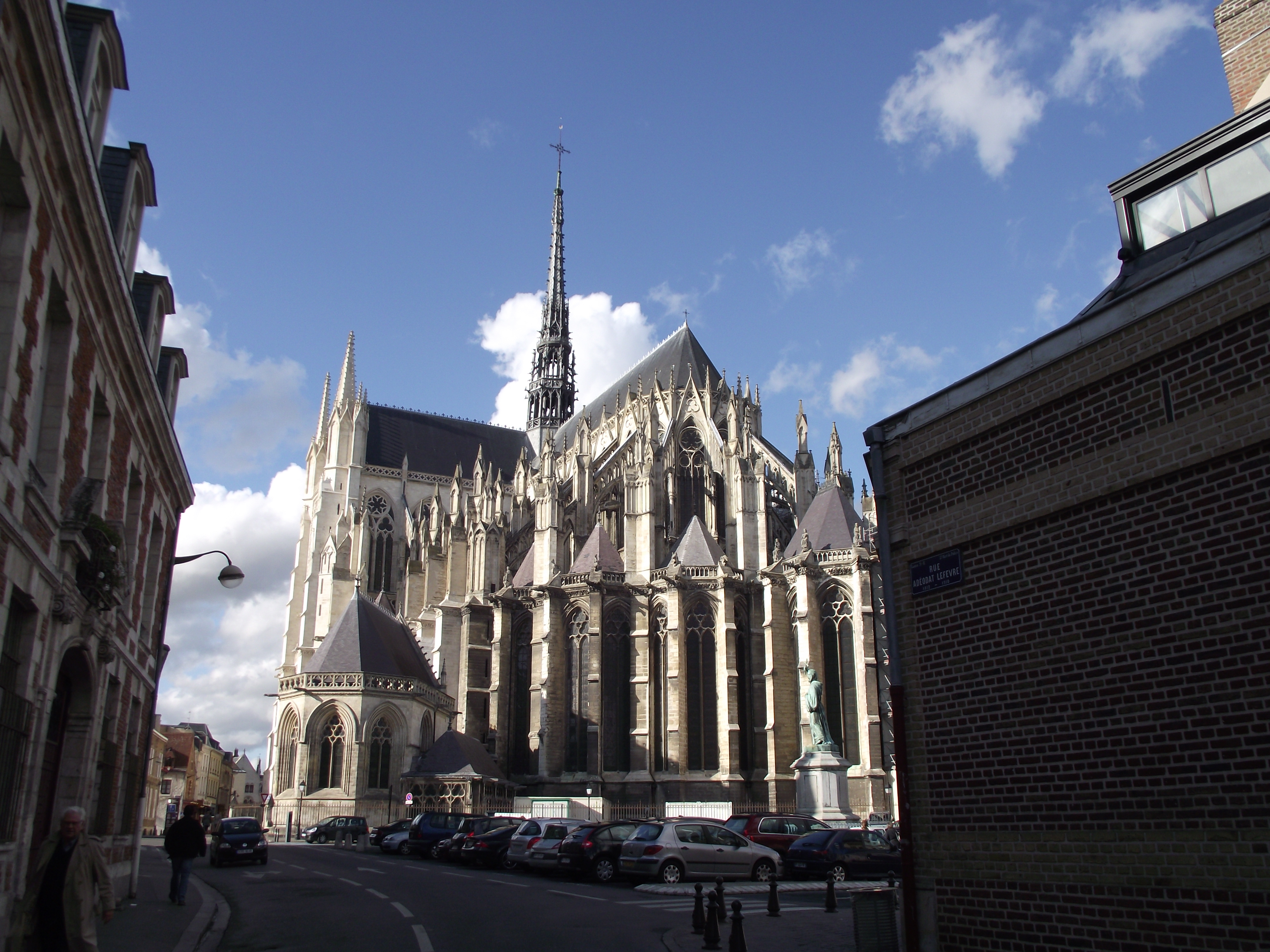 Amiens, Cattedrale di Nostra Signora